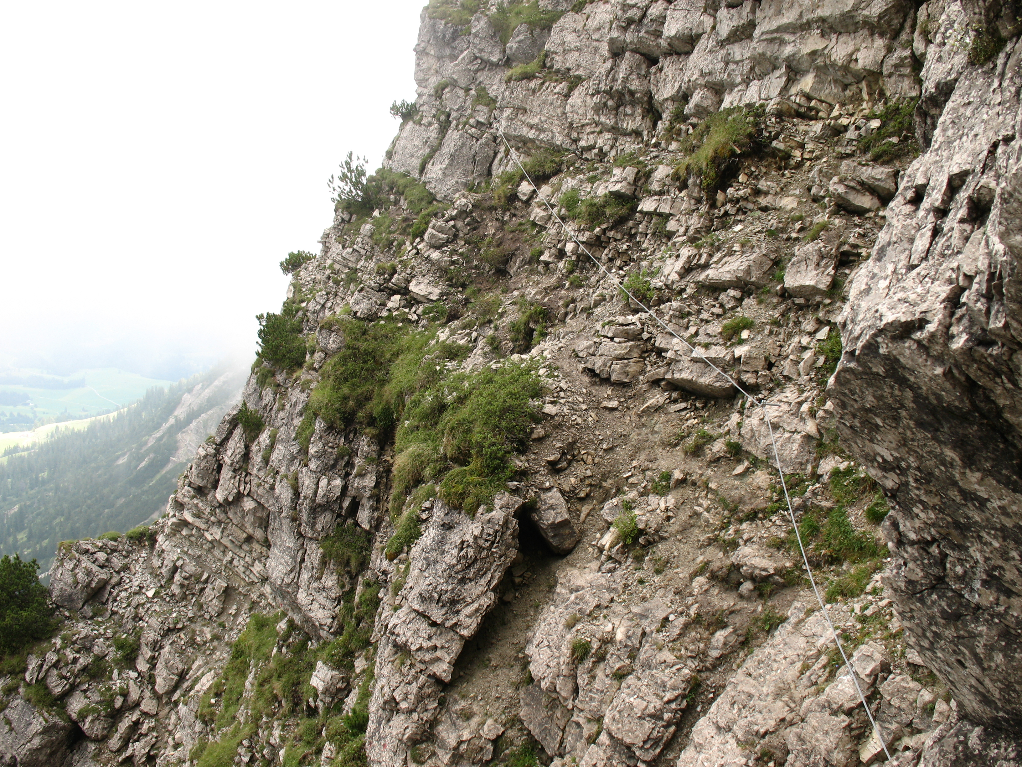 Im zweiten Teil des Iseler-Klettersteigs.